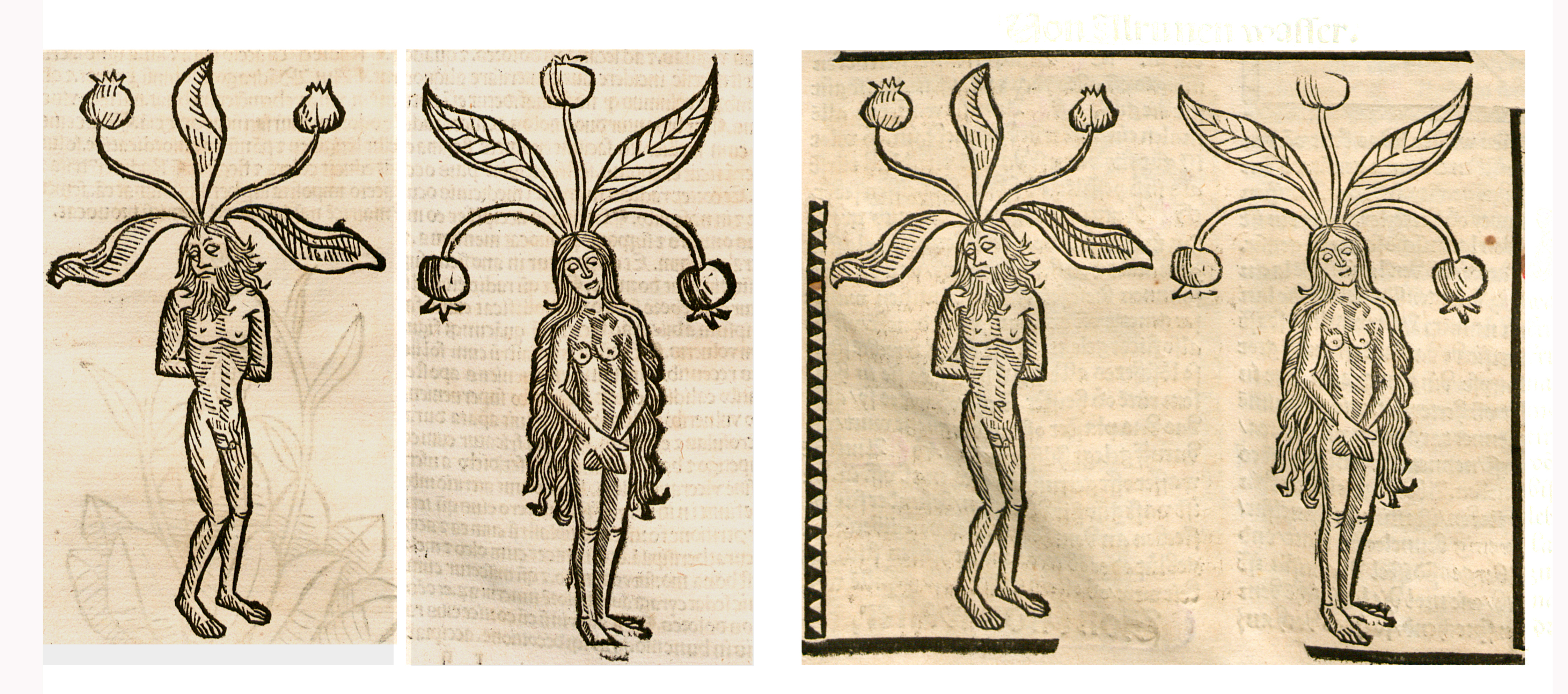 Abbildung von: Alraune